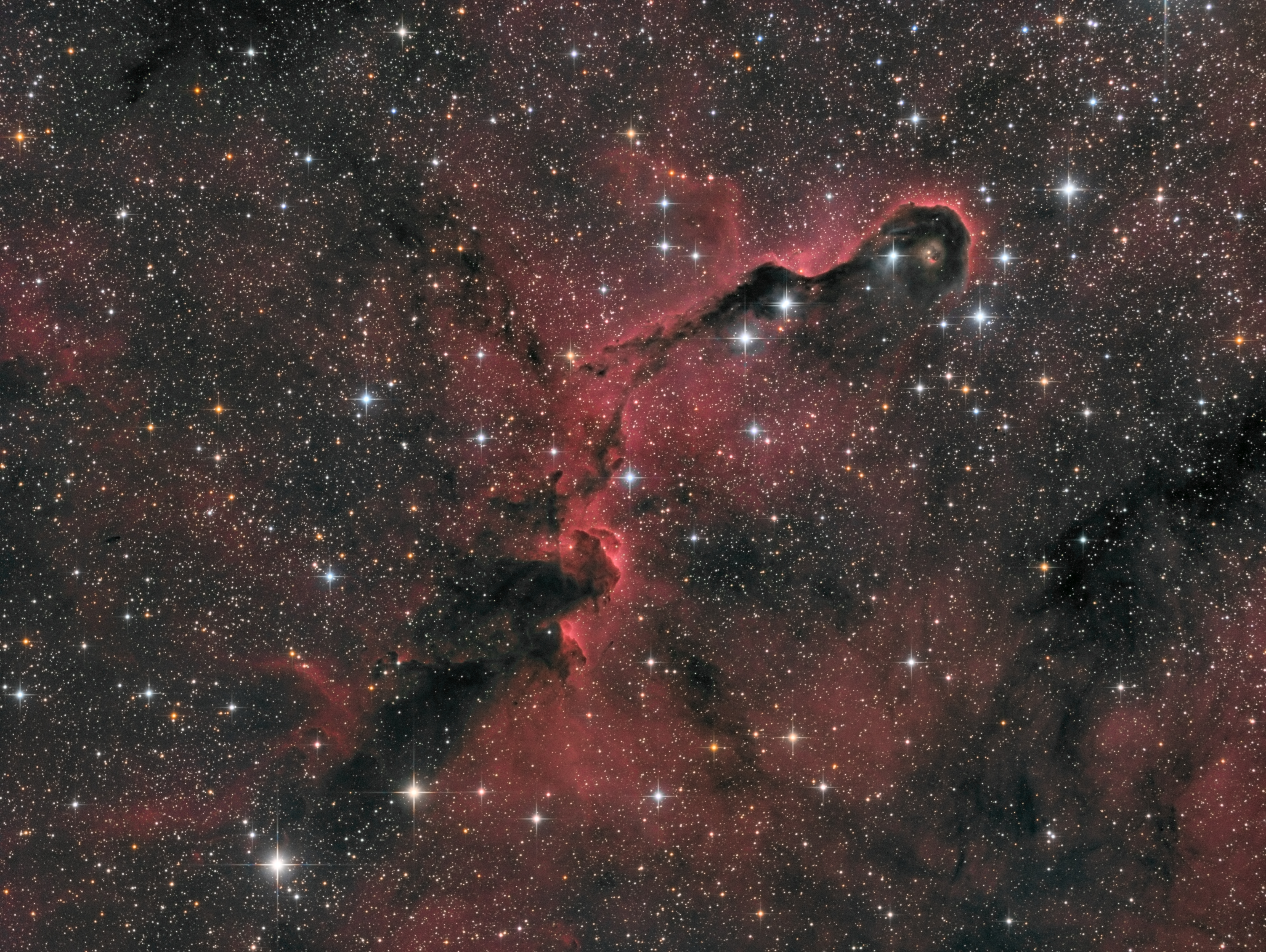 IC1396A Sloní chobot